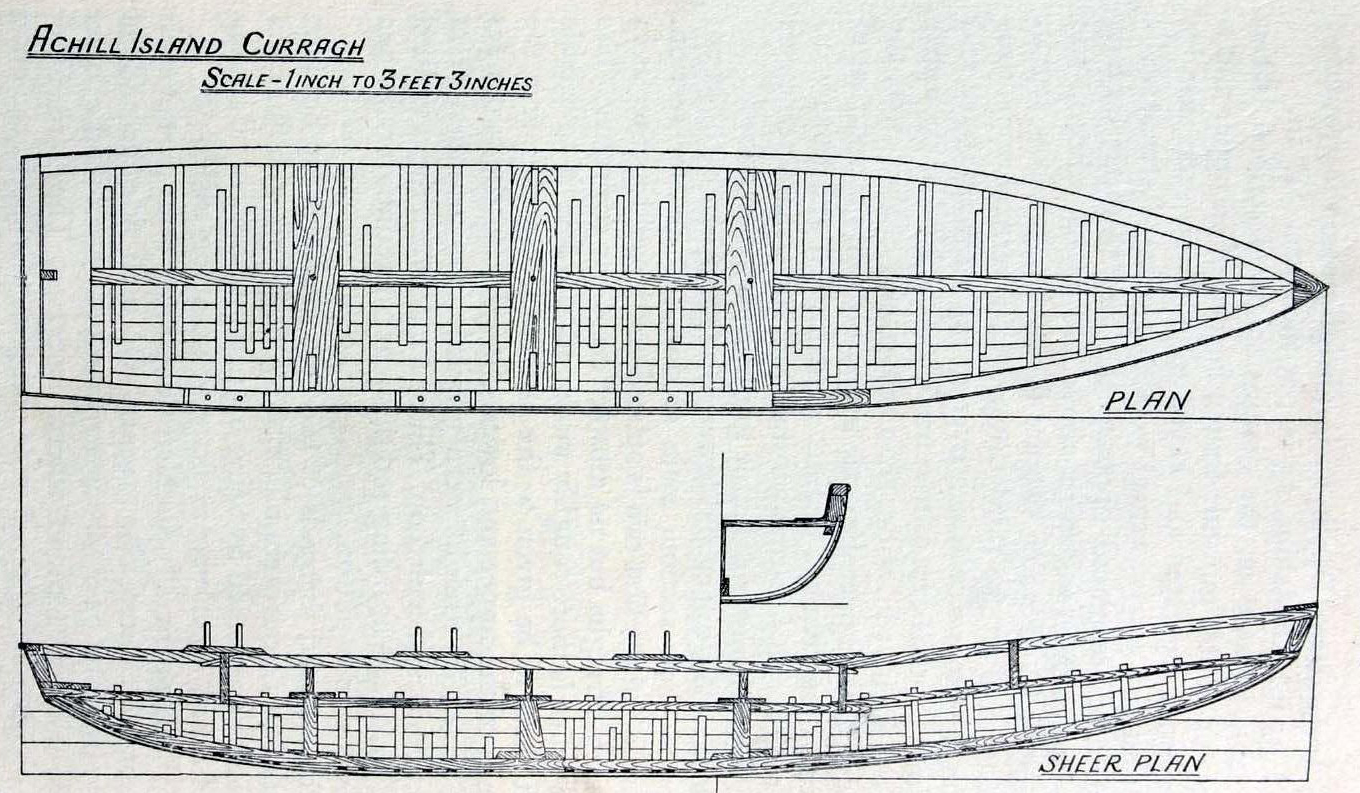 Теоретический чертёж курраха острова Акилл